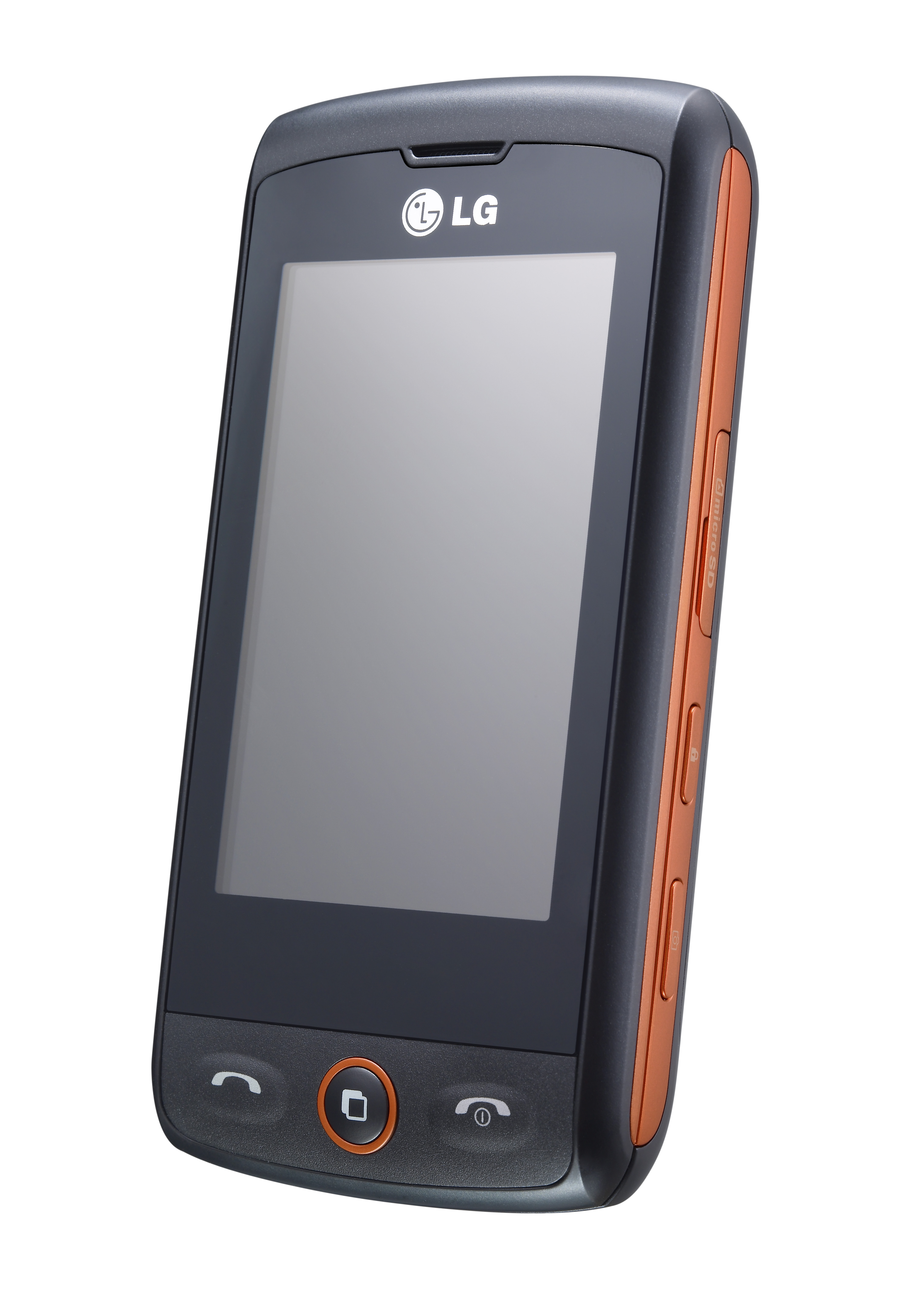 LG??, ?? ?S-Class UI? ??? 2?? ???? 4 ??? ??? ??? ?? ?? ? ?????? ???? ??????? 2009? (6/16~19) ?? ?????? ????? ????? ??? 30??? ??? ?? ?? ??S-??? UI???? ????, ????, ???, ?? ??? ? 2009? ?? ?? ?? ??? ? LG?? MC???? ??? ???, ????? ?? ???, ???, ???????? ? ?? S-??? UI? ??? ???? ??? ????? ??? ??? ??? ???? ???? ??? ??